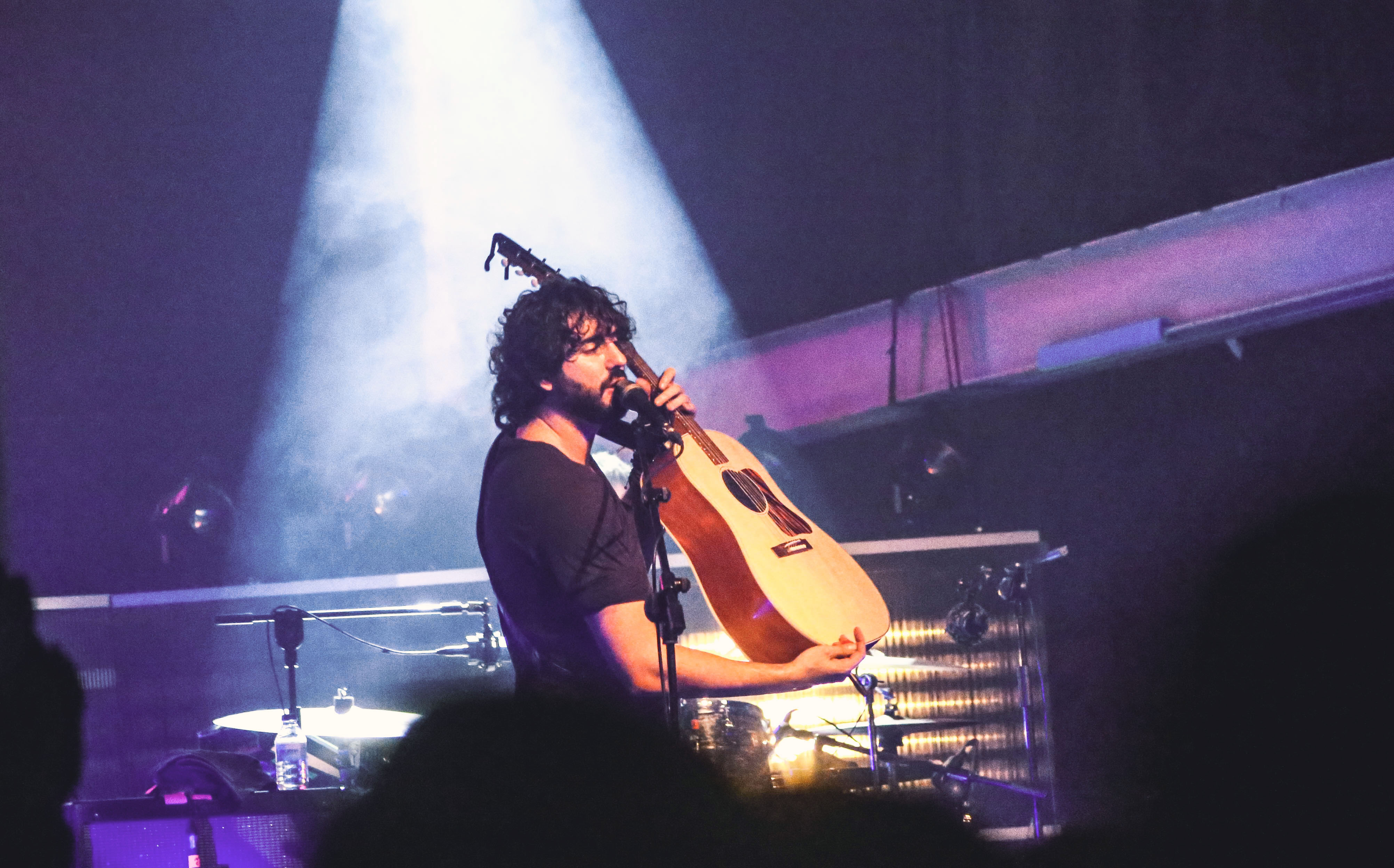 Izal en Valladolid